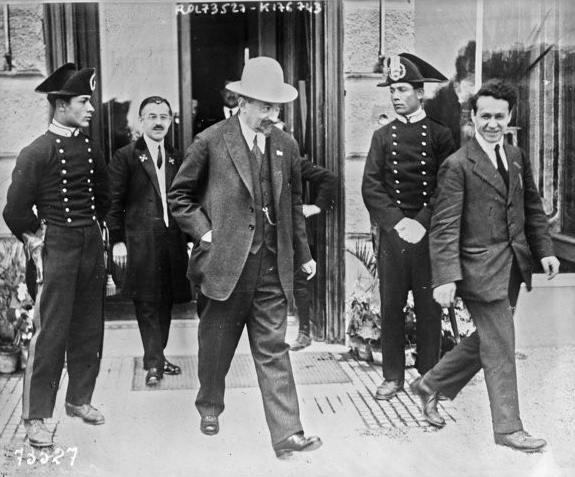 Chicherin saliendo del hotel Imperial de Génova en 1922.